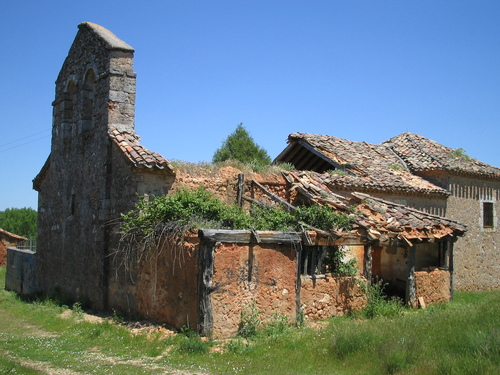 Iglesia en ruinas de Valdegrulla